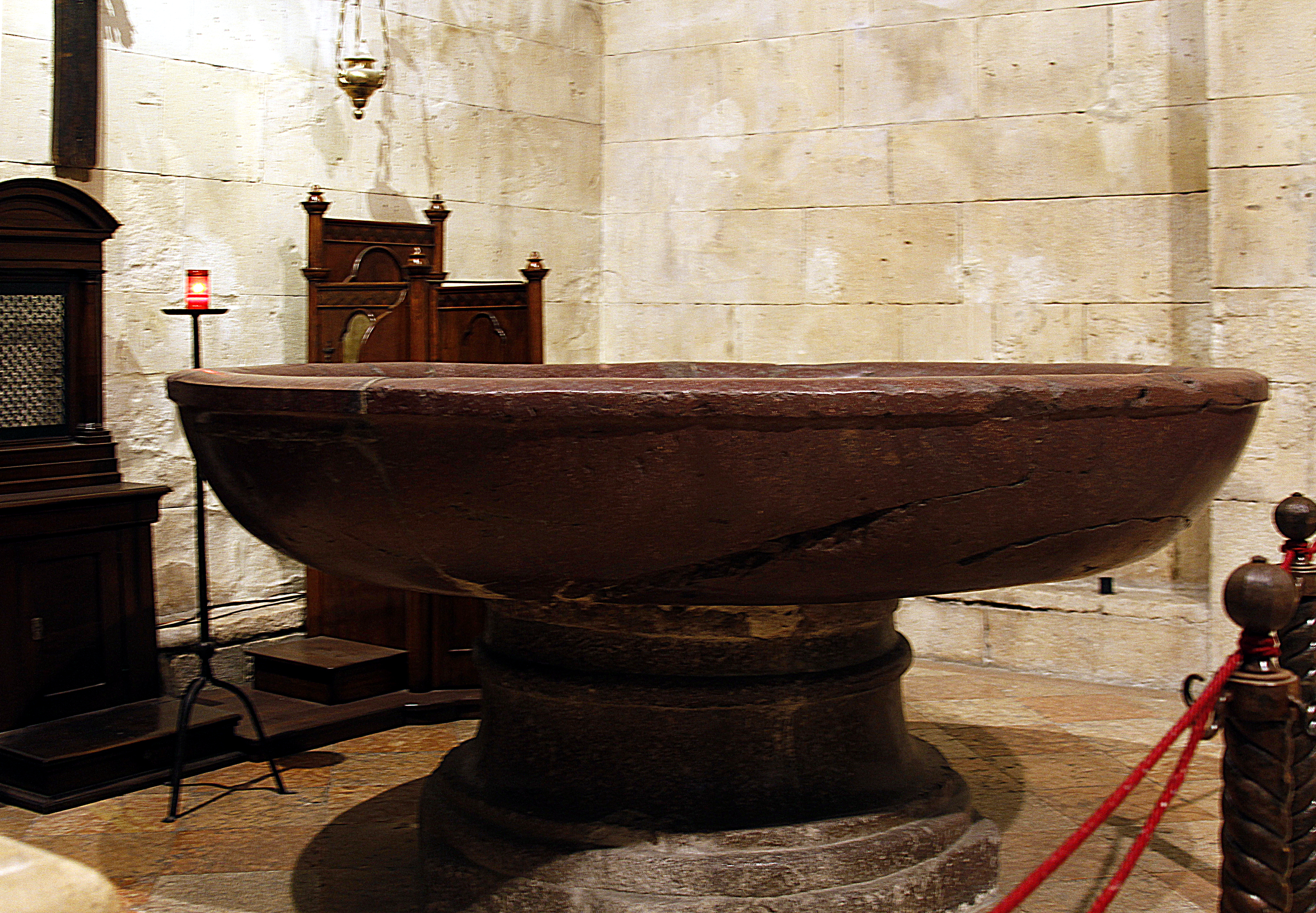 San Zeno - Verona